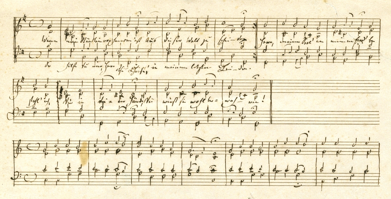 Autograph Robert Schumanns: Notenblatt mit einem textierten und einem skizzierten Choral. In Endenich wahrscheinlich im Juni 1856 entstanden.